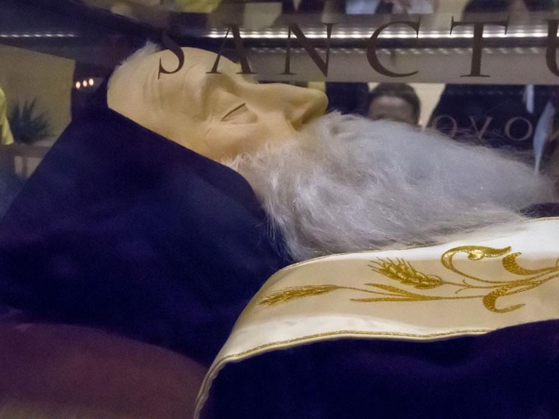 Sveti Leopold Mandić u Zagrebu